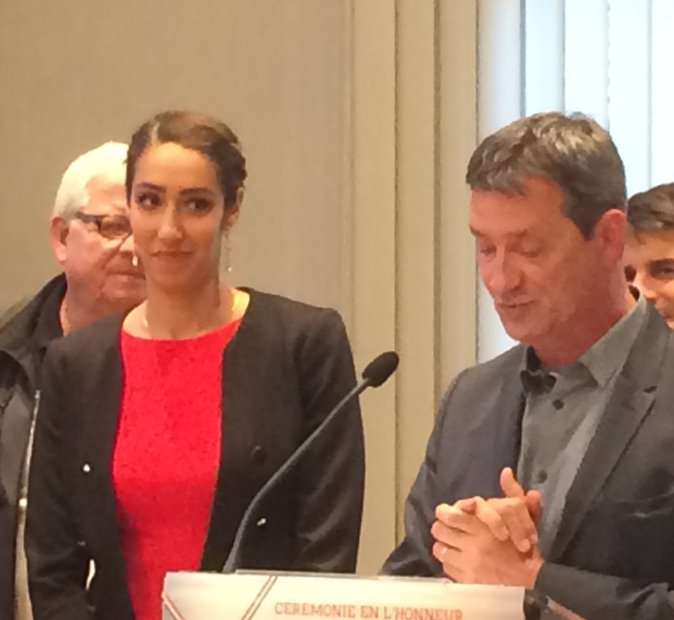 La karatéka franco-algérienne Lamya Matoub le 2 mai 2018 à Pierrefitte (avec le premier adjoint au Maire en charge des sports Christian Pernot).